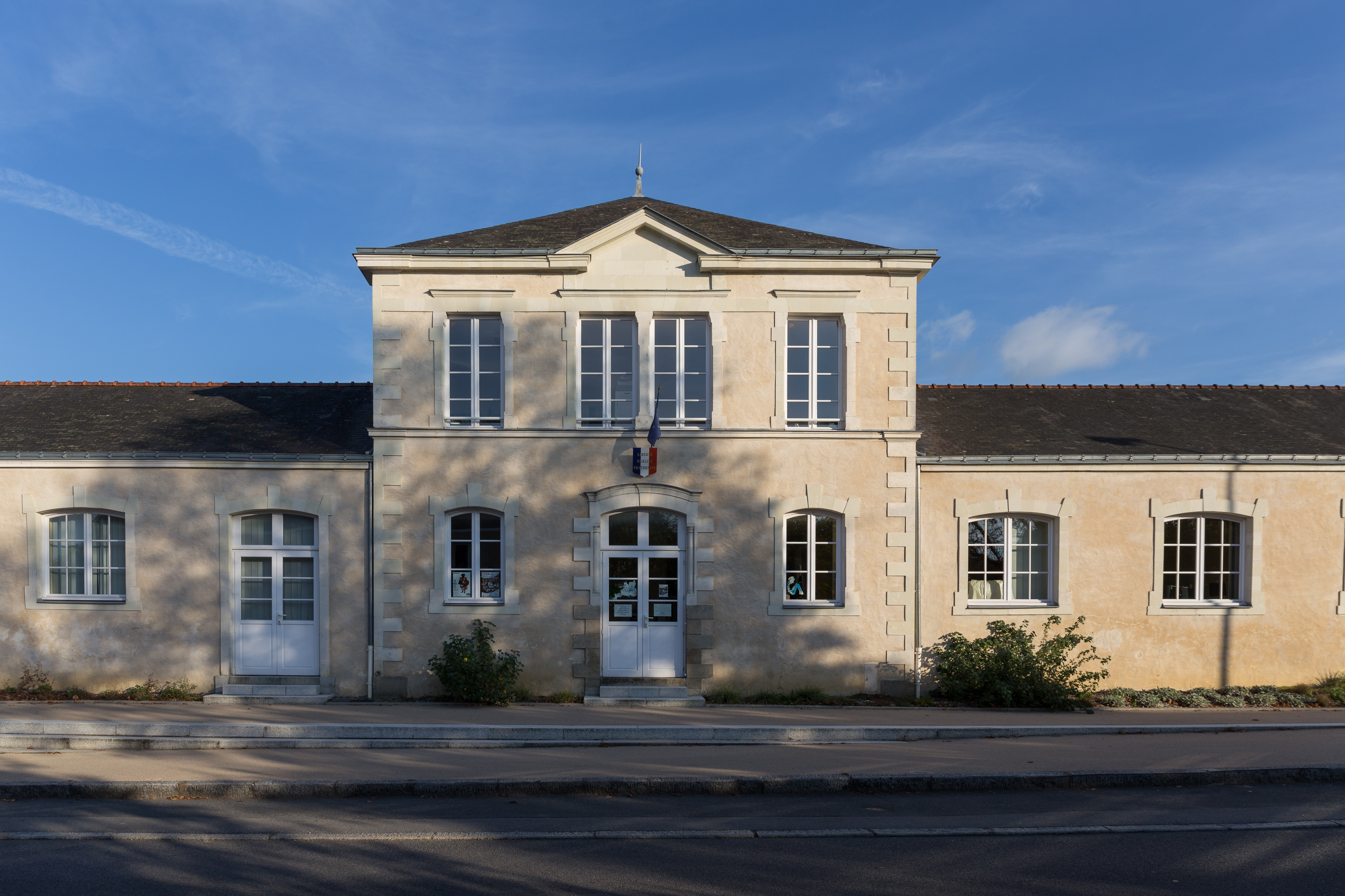 Mairie de Drefféac.